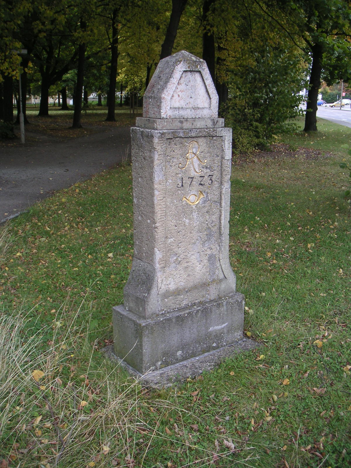 kursächsischer Viertelmeilenstein in Chemnitz, Hartmannstraße Ecke Bergstraße